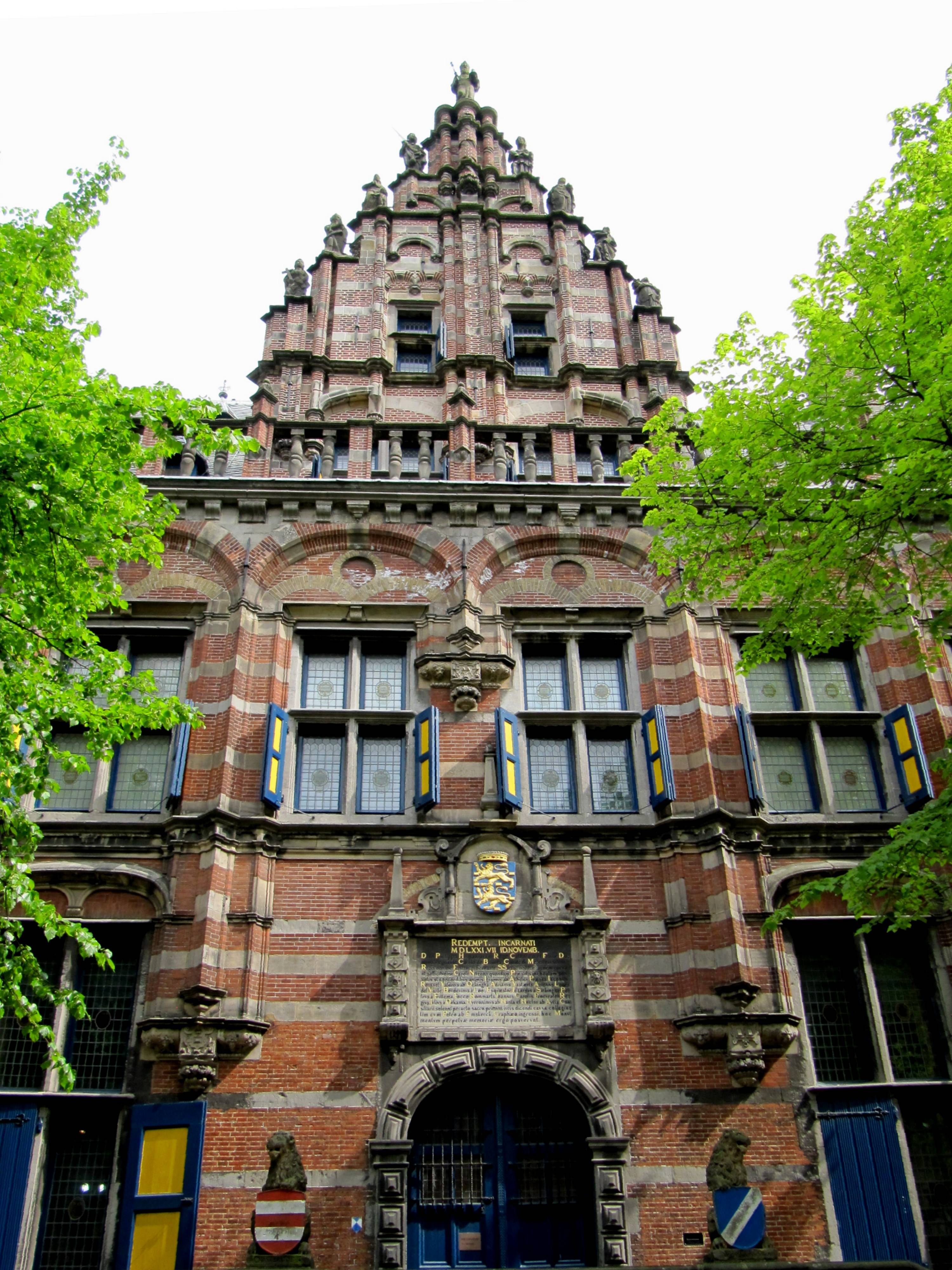 Kanselarij. Belangrijk renaissance gebouw in 1566-'71 opgetrokken als gerechtshof. Bordes 1621. Gerestaureerd 1893-'96. (Thans onderdeel Fries Museum).